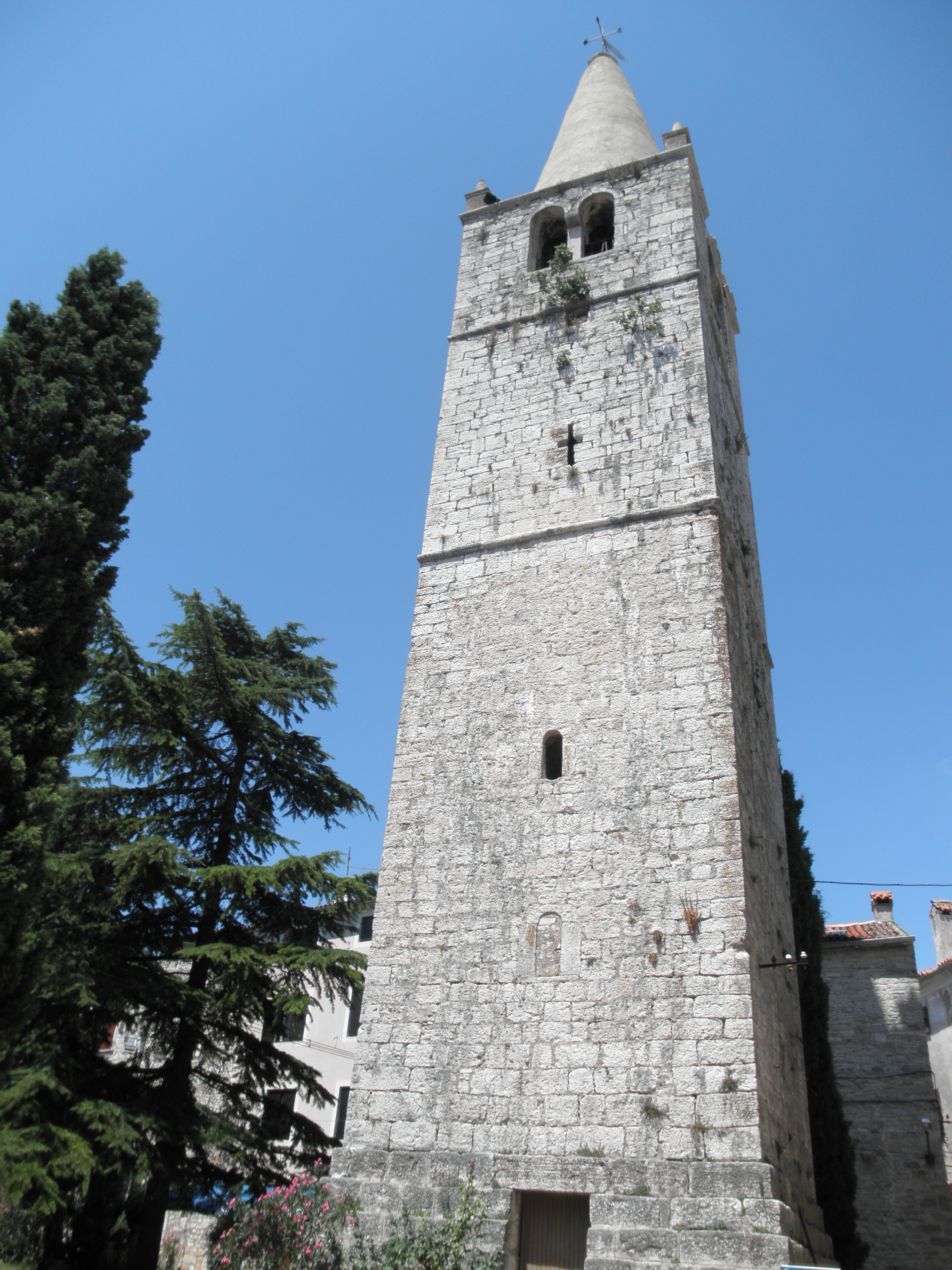 Horloĝa turo de la preĝejo San Giuliano en Bale - Valle